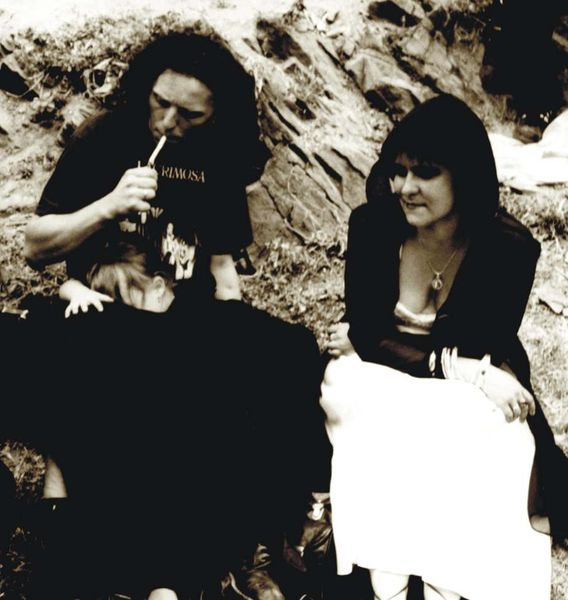 Goci - Publiczność na Castle Party